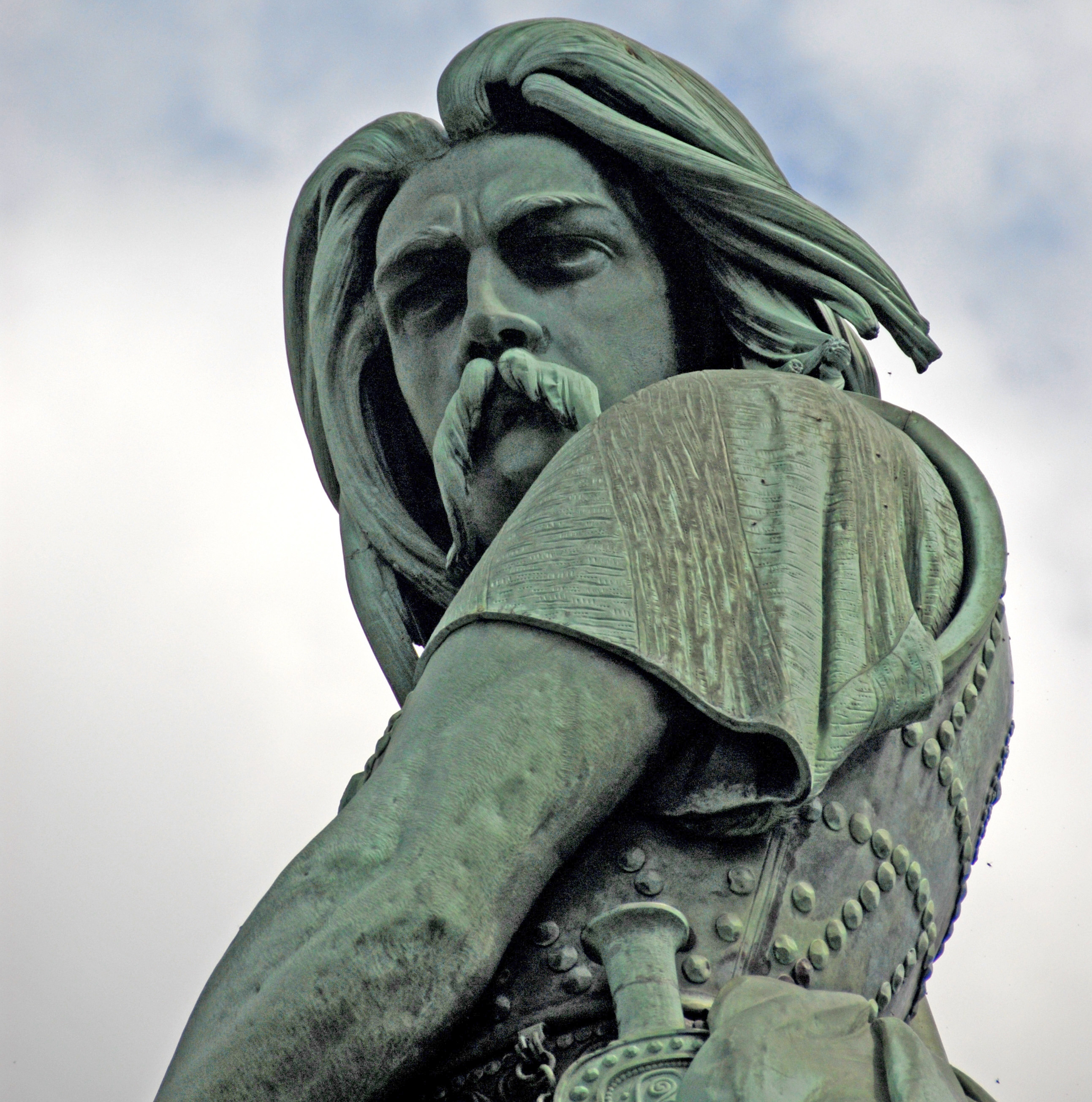 Alesia,_Statue_Vercingetorix, Detail